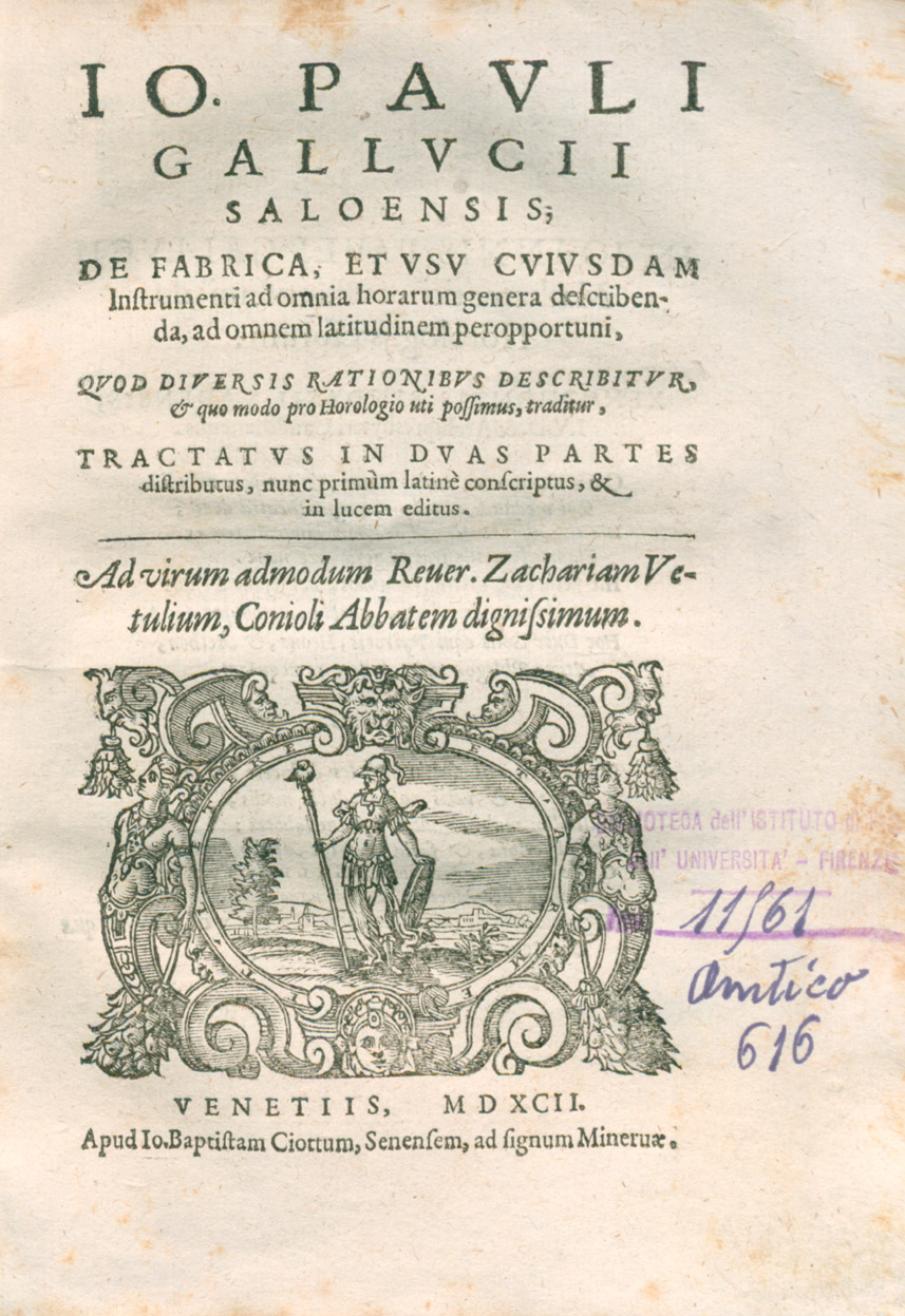 Frontespizio